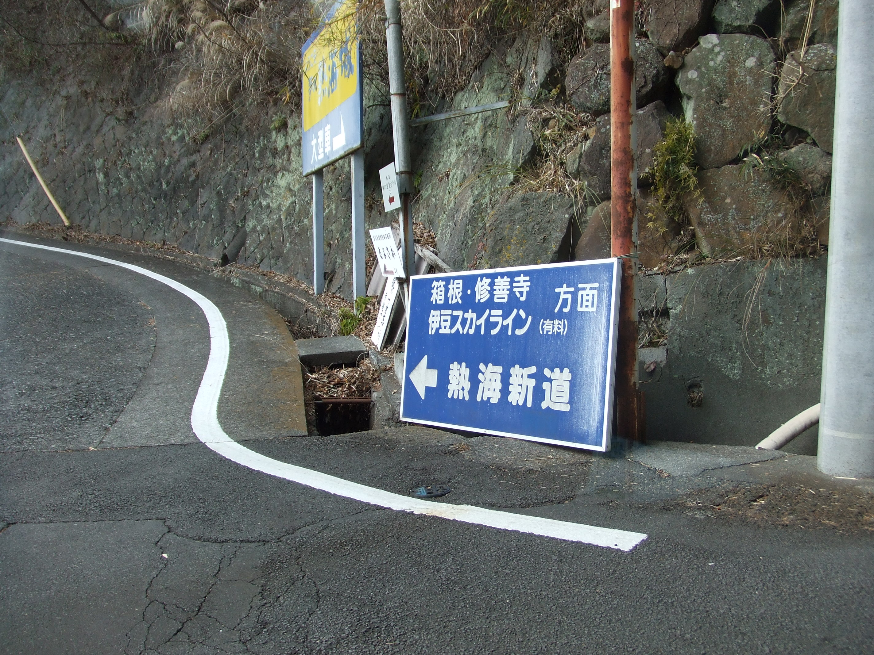 静岡県熱海市熱海城付近にある熱海新道の標識